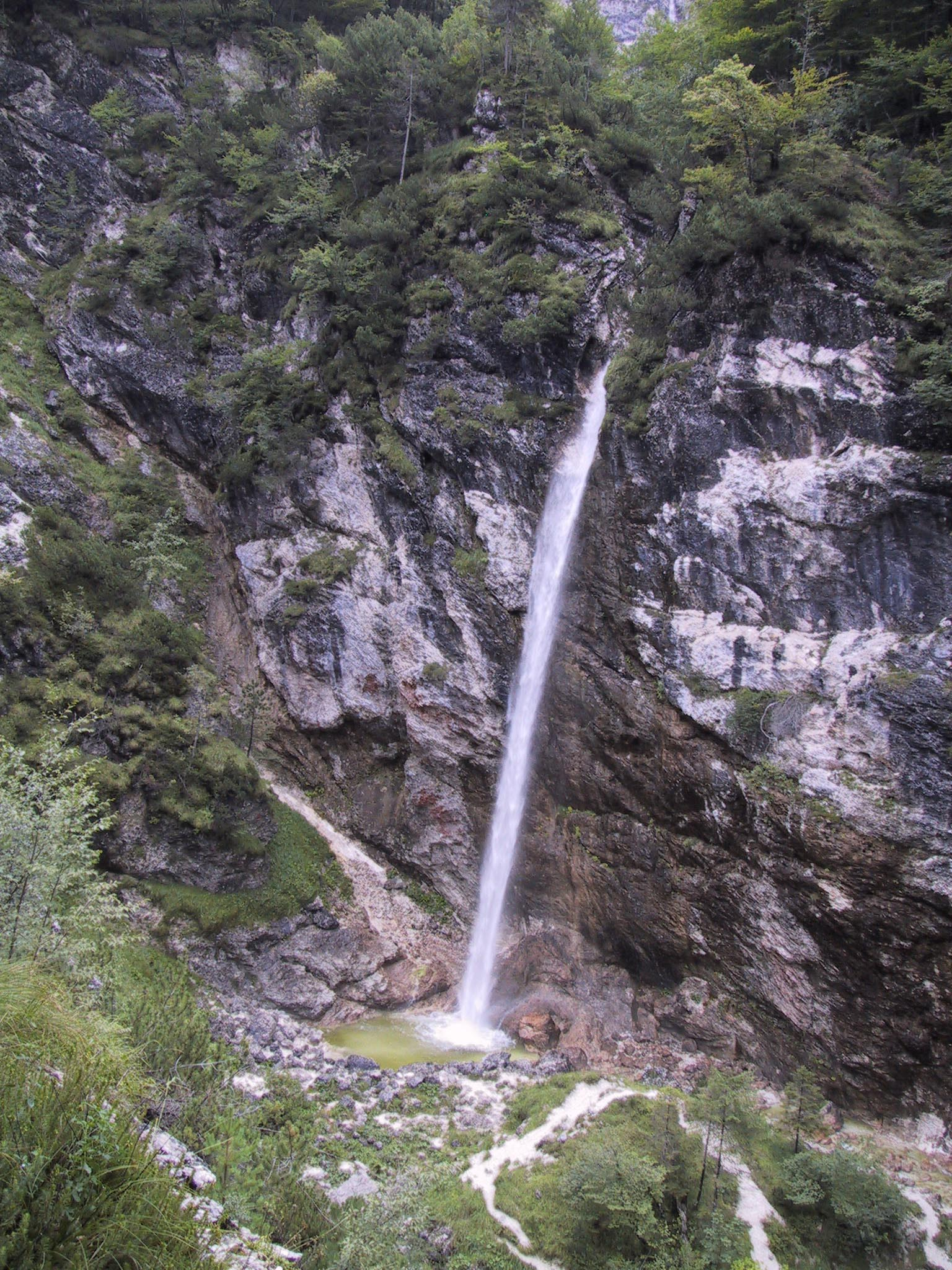 Slap Parabola na Fratarici